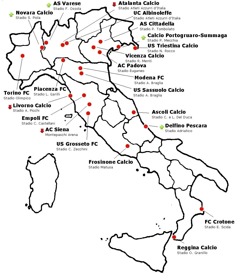 Distribuzione geografica squadre serie b 10-11